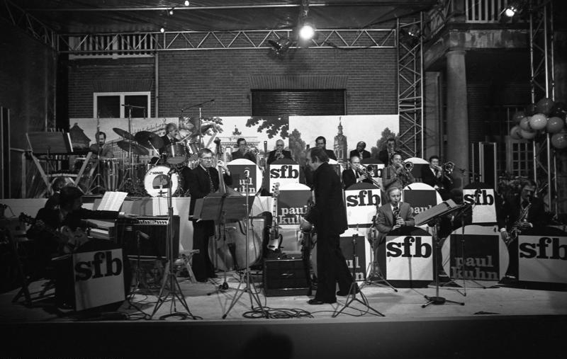 Laubenpieperfest in der Landesvertretung Berlin